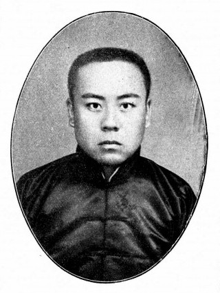 中文（台灣）: 王秉謙議員